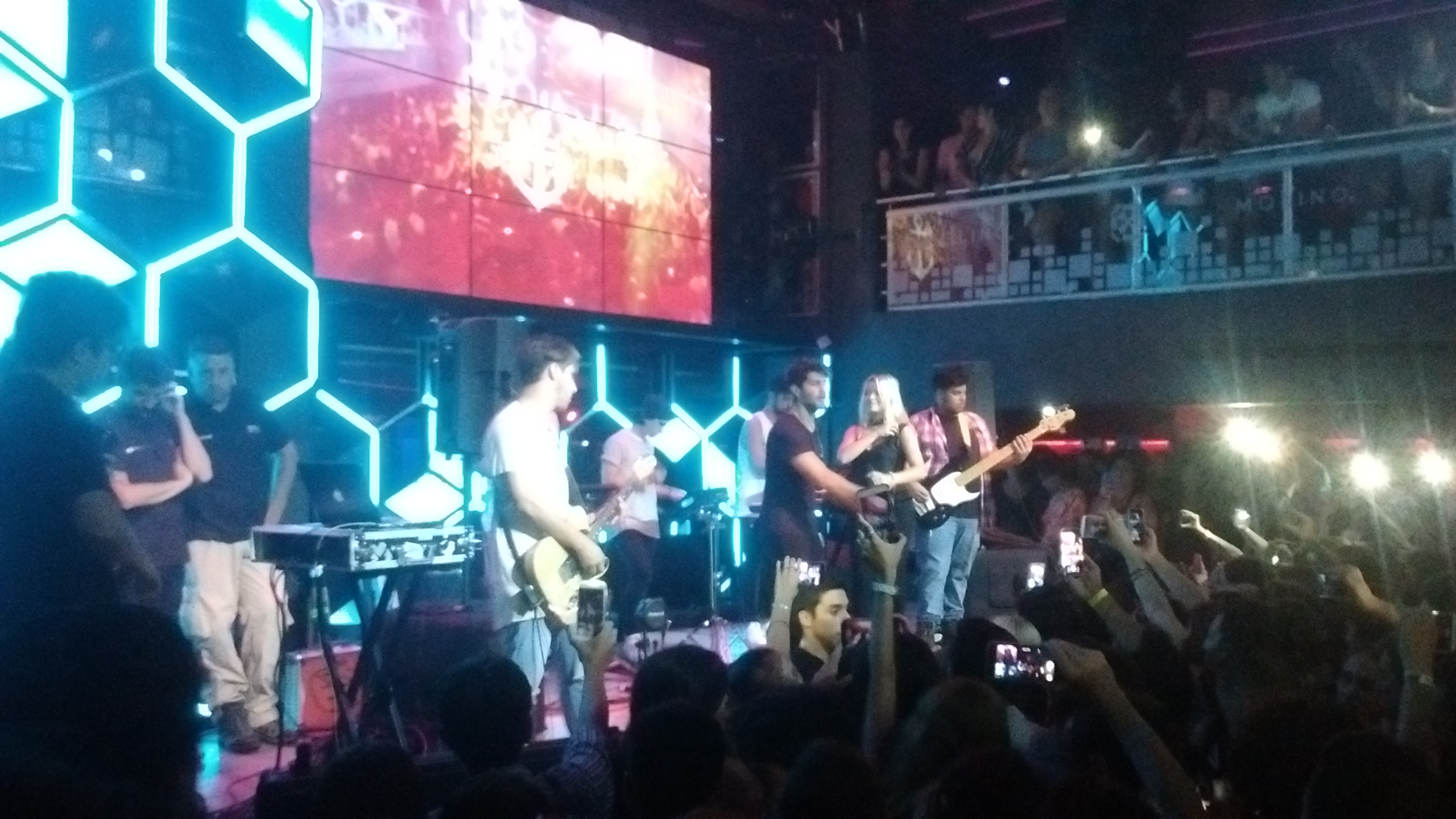 Rombai, grupo de cumbia de origen uruguayo en Molino Rojo, Carlos Paz, Argentina.